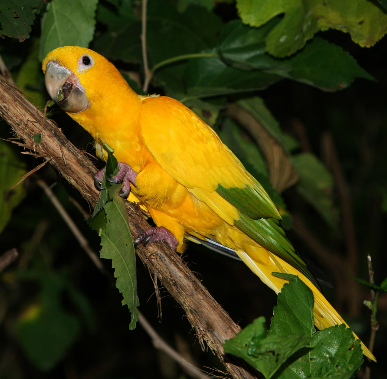 Golden Conure (Guaruba guarouba) Parque das Aves, Foz do Iguaçu, Brazil